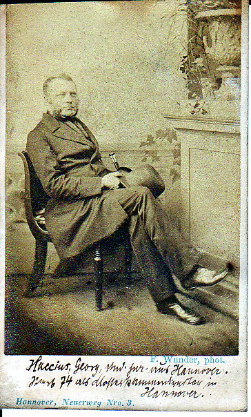 Porträt Georg Haccius, Präsident der Klosterkammer Hannover